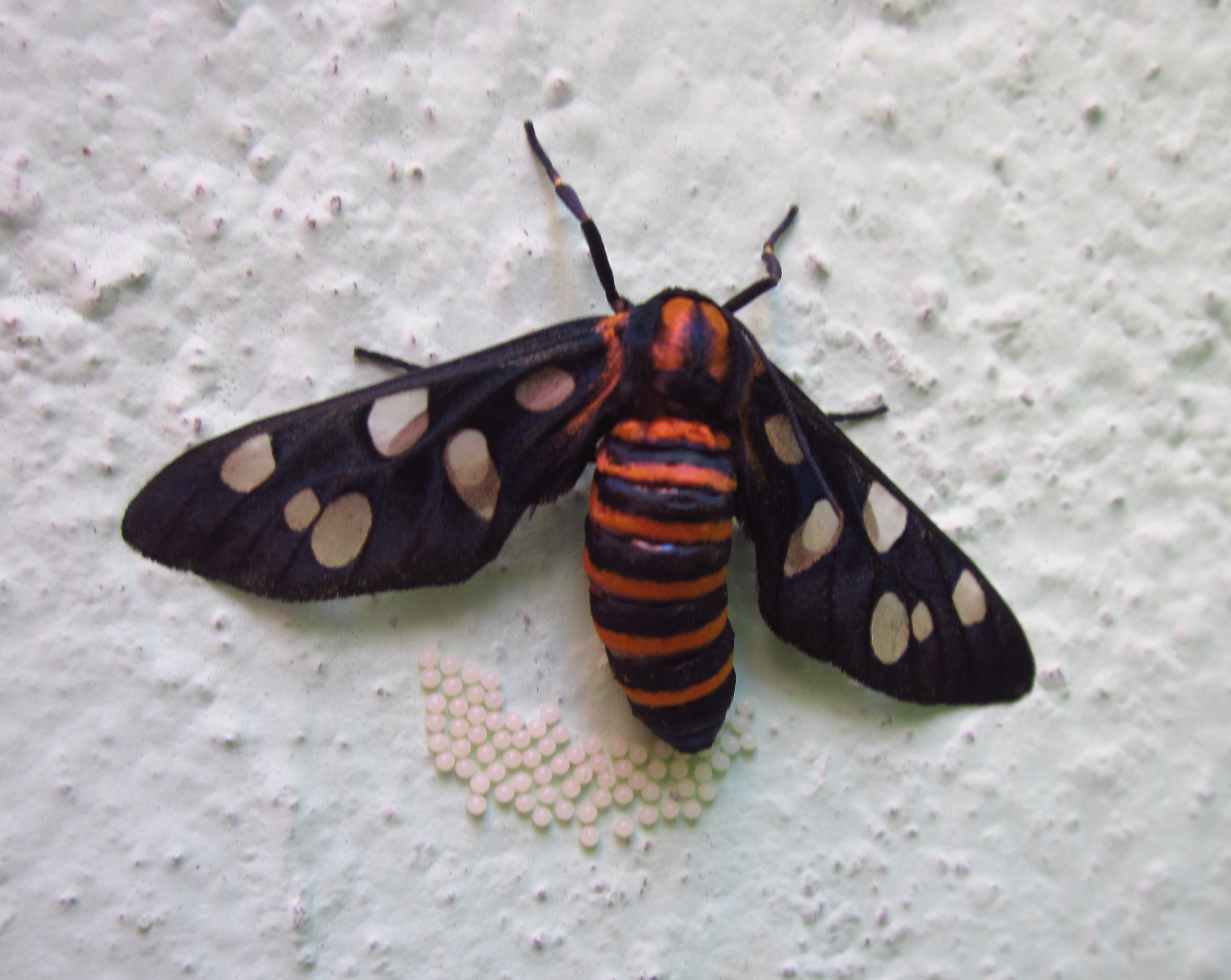 முட்டையிட்டுக் கொண்டிருக்கும் போது எடுத்தது